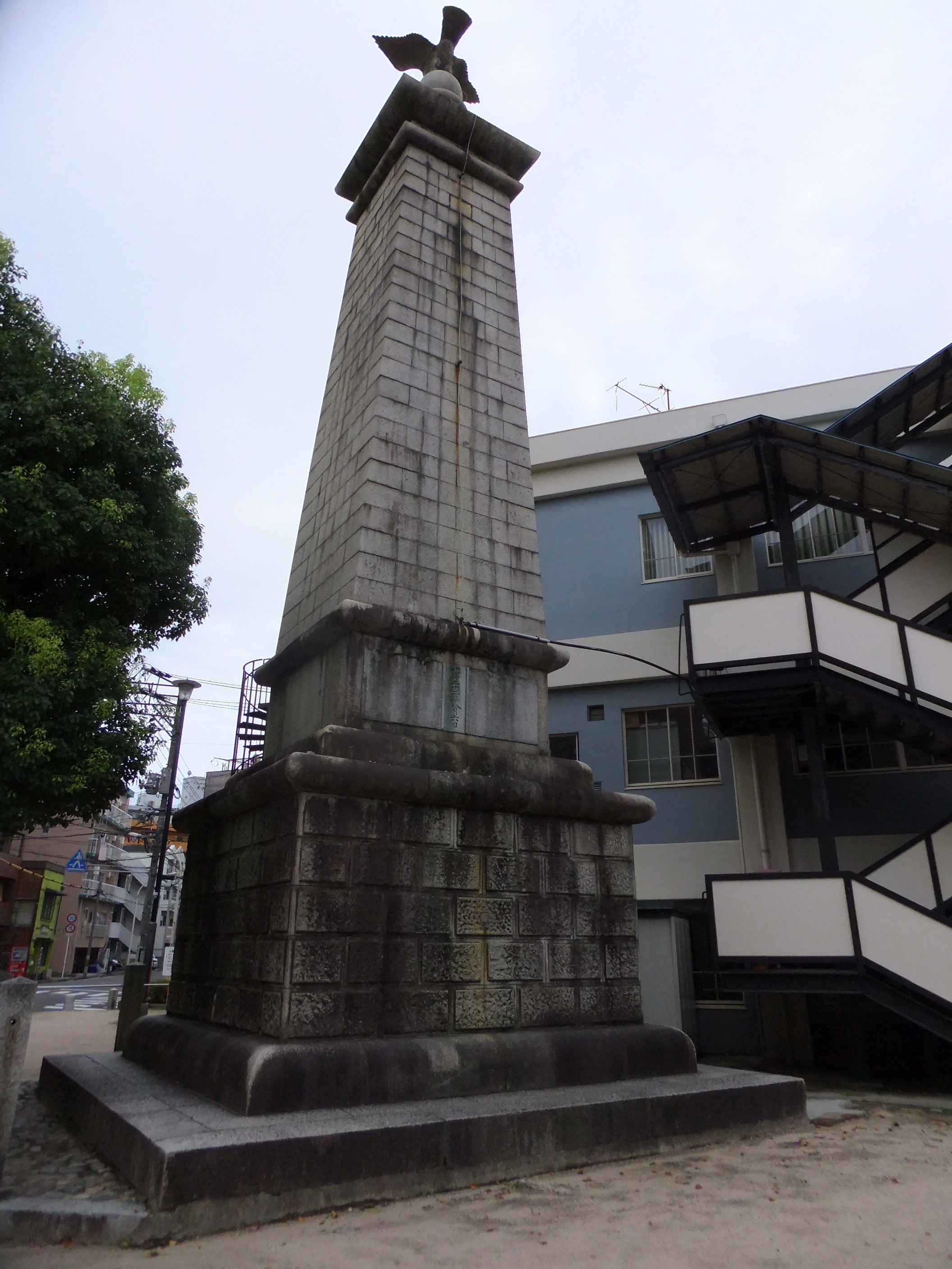 旧日清戦争凱旋碑